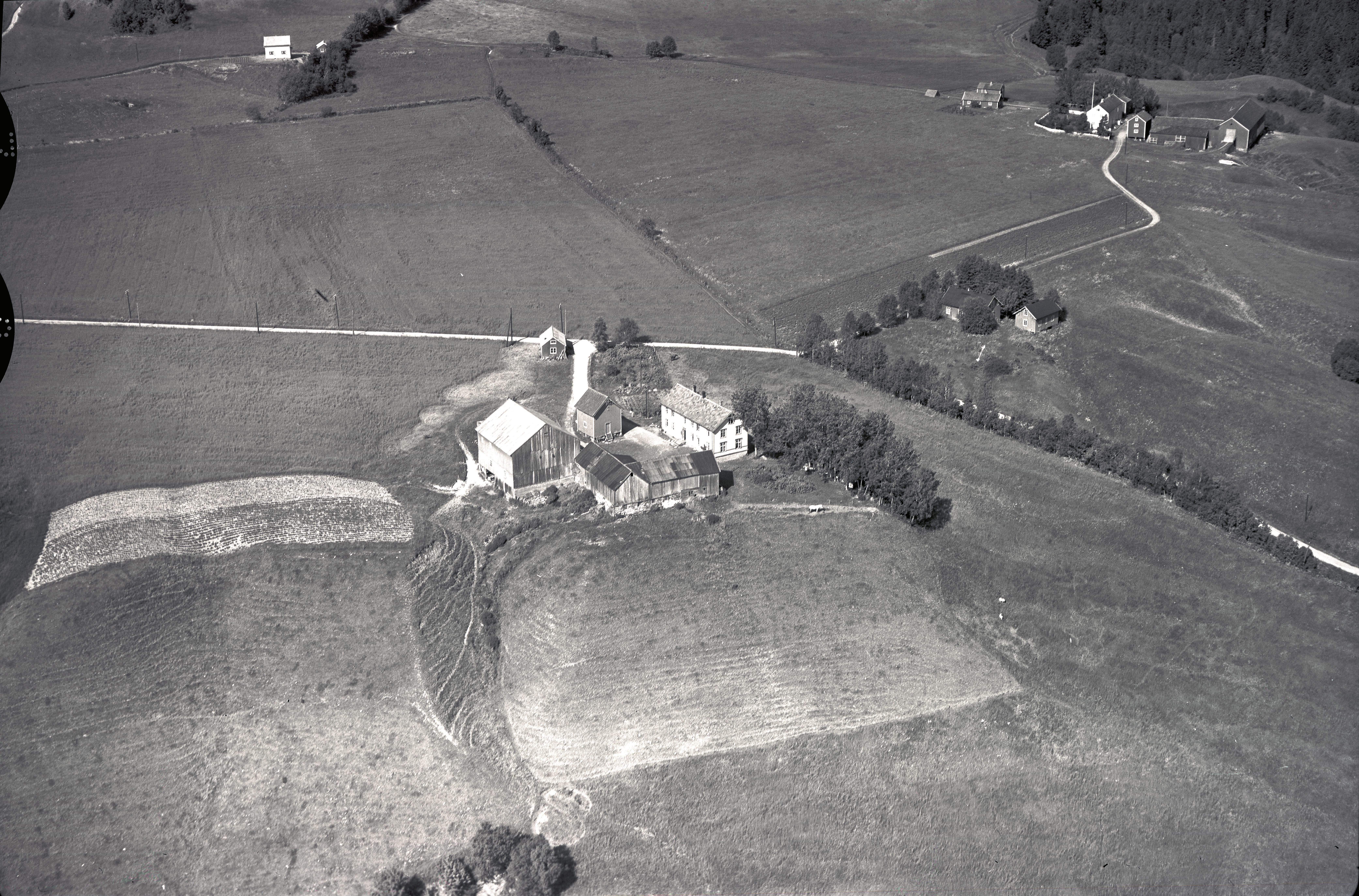 Gårdsbruk i Leinstrand: Flatås nordre. I forgrunnen, gnr. 37, bnr. 2, i bakgrunnen til høyre, gnr. 37, bnr. 1. Det nærmeste bruket ble eid og brukt av brødrene Johan og Hjalmar Vanvik. Nabobruket ble eid av Lars Føll. På veien midt imellom ligger Flata, halvt skjult bak tette trekroner. Flata hadde bnr. 37 og var trolige gammel husmannsplass.